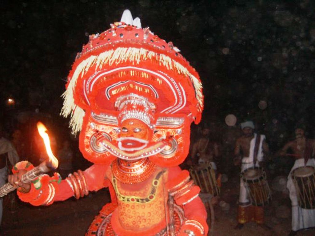 കണ്ണൂർ ജില്ലയിലെ കണ്ണപുരം പഞ്ചായത്തിലെ കീഴറ കൂലോം ഭഗവതി ക്ഷേത്രത്തിൽ കളിയാട്ടത്തോടനുബന്ധിച്ച് കെട്ടിയാടിയ വയനാട്ടുകുലവൻ തെയ്യം